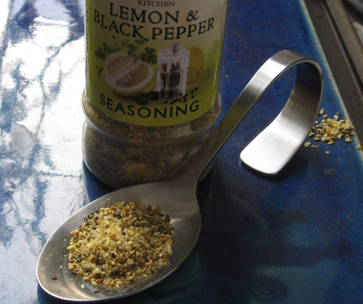 Gewürzsalz Zitronepfeffer wie er in Südafrika erhältlich ist.